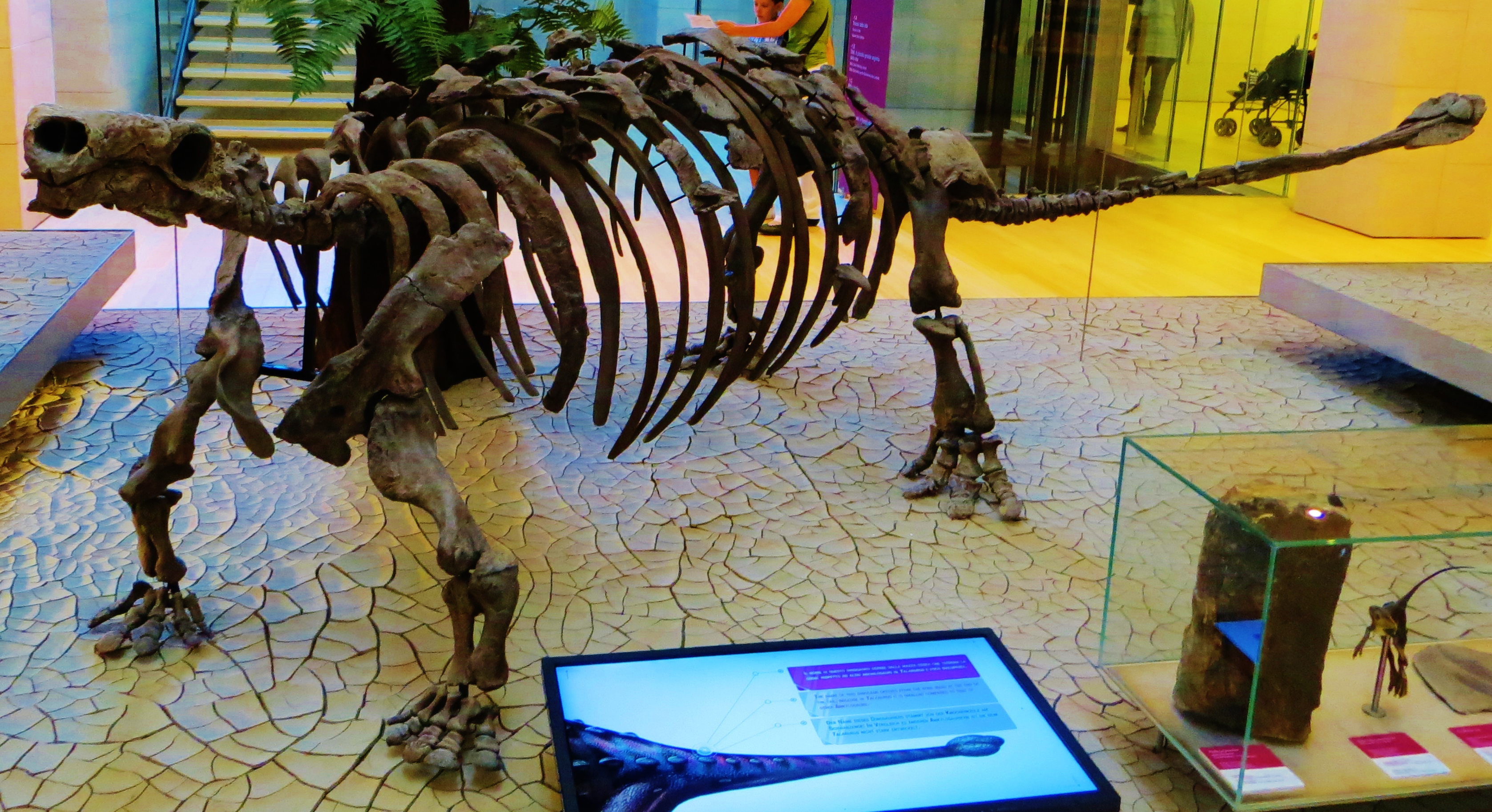 Fossil of Talarurus, an extinct reptile- Took the picture at Muse (Trento)